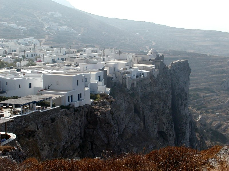 Die Chora von Folegandros am 300m Kliff